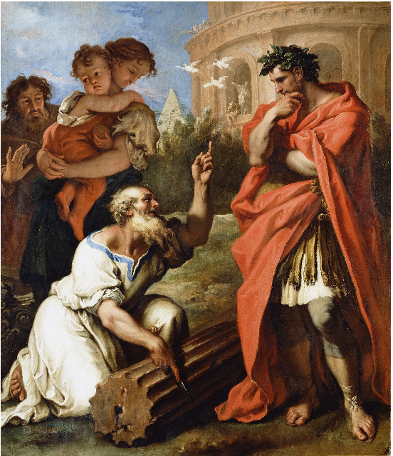 Музей Гетти (J. Paul Getty Museum): Риччи Себастьяно (1659 Беллуно - 1734 Венеция) - Тарквиний Древний вопрошает авгура Аттия Навия (162х138 см) около 1690 год